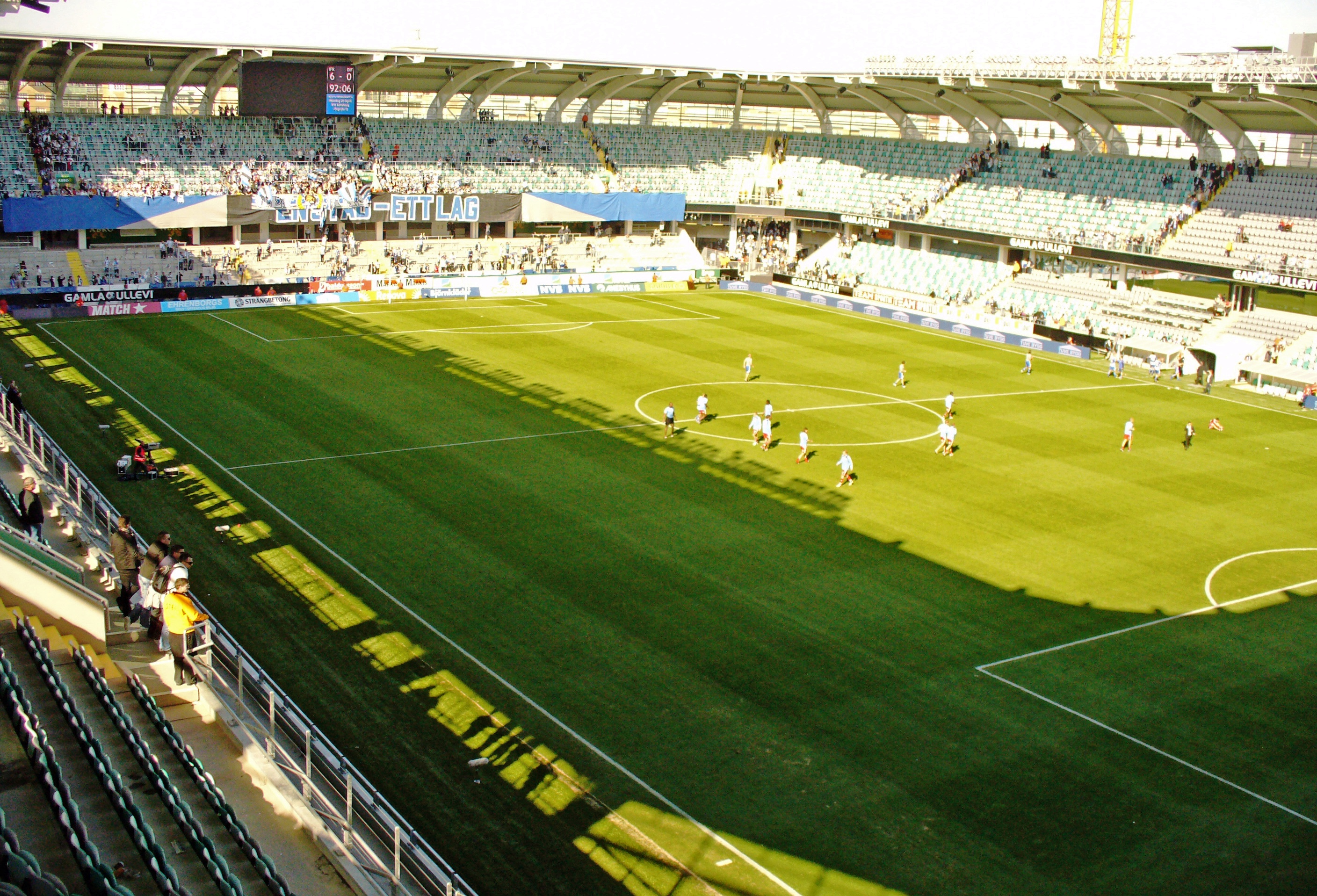 Vy över Gamla Ullevi efter matchen mellan IFK Göteborg och Djurgårdens IF på påskafton 2009.